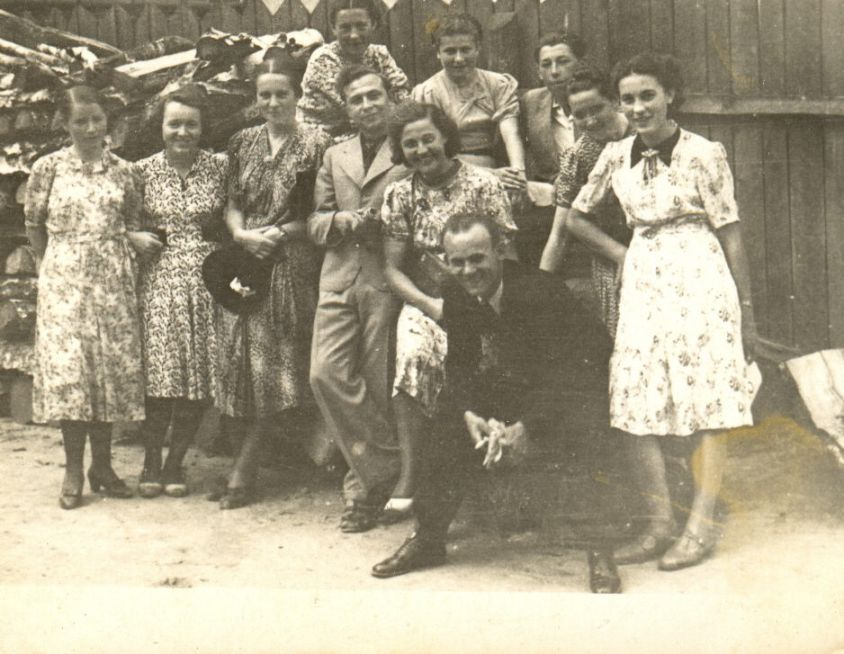 Любачів_довоєнний,_1939_р.: родина Станьків в Любачеві.